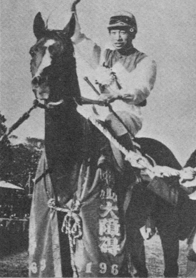 フジノオー